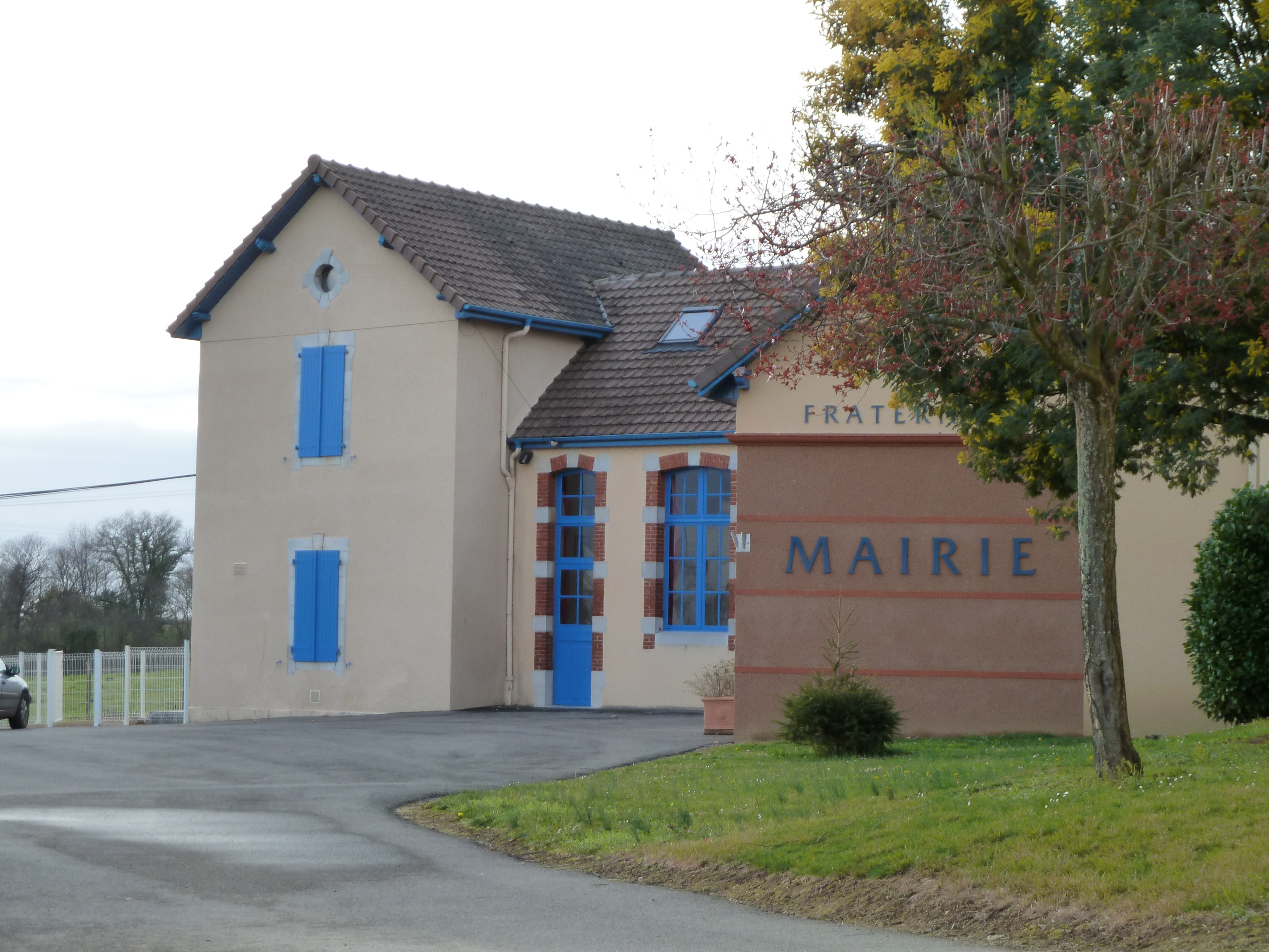 Mairie de Lonçon